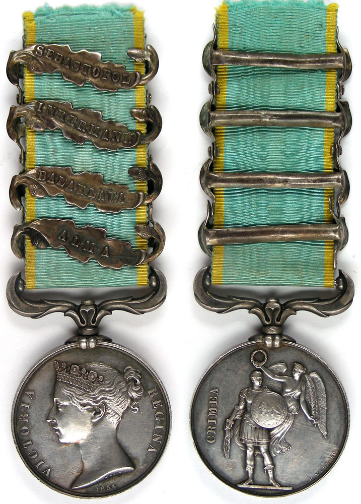 Avers et revers de la médaille britannique commémorative de la guerre de Crimée 1855-1855, avec agrafes : Sebastopol, Inkermann, Balaklava, Alma